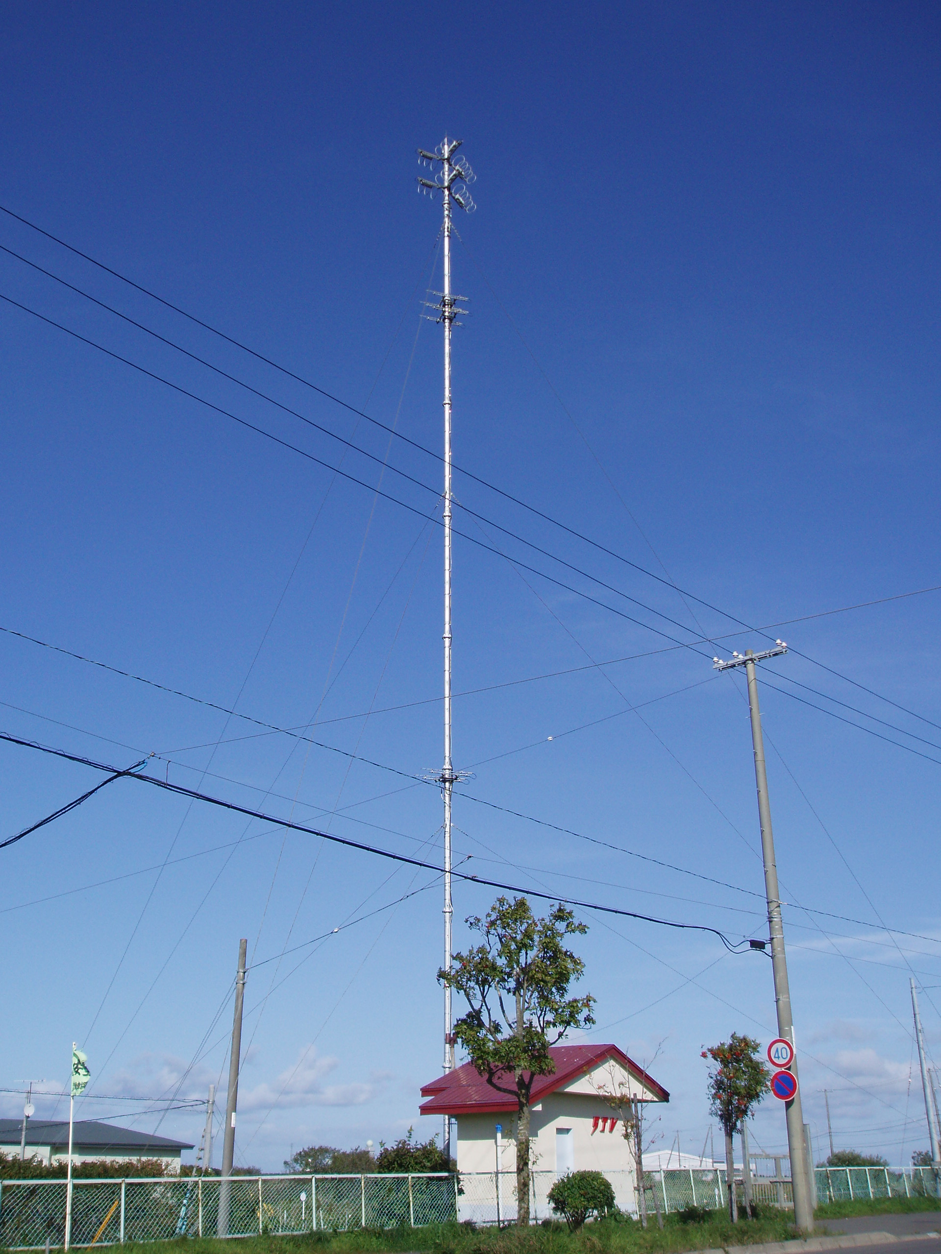 根室中継局（STV）